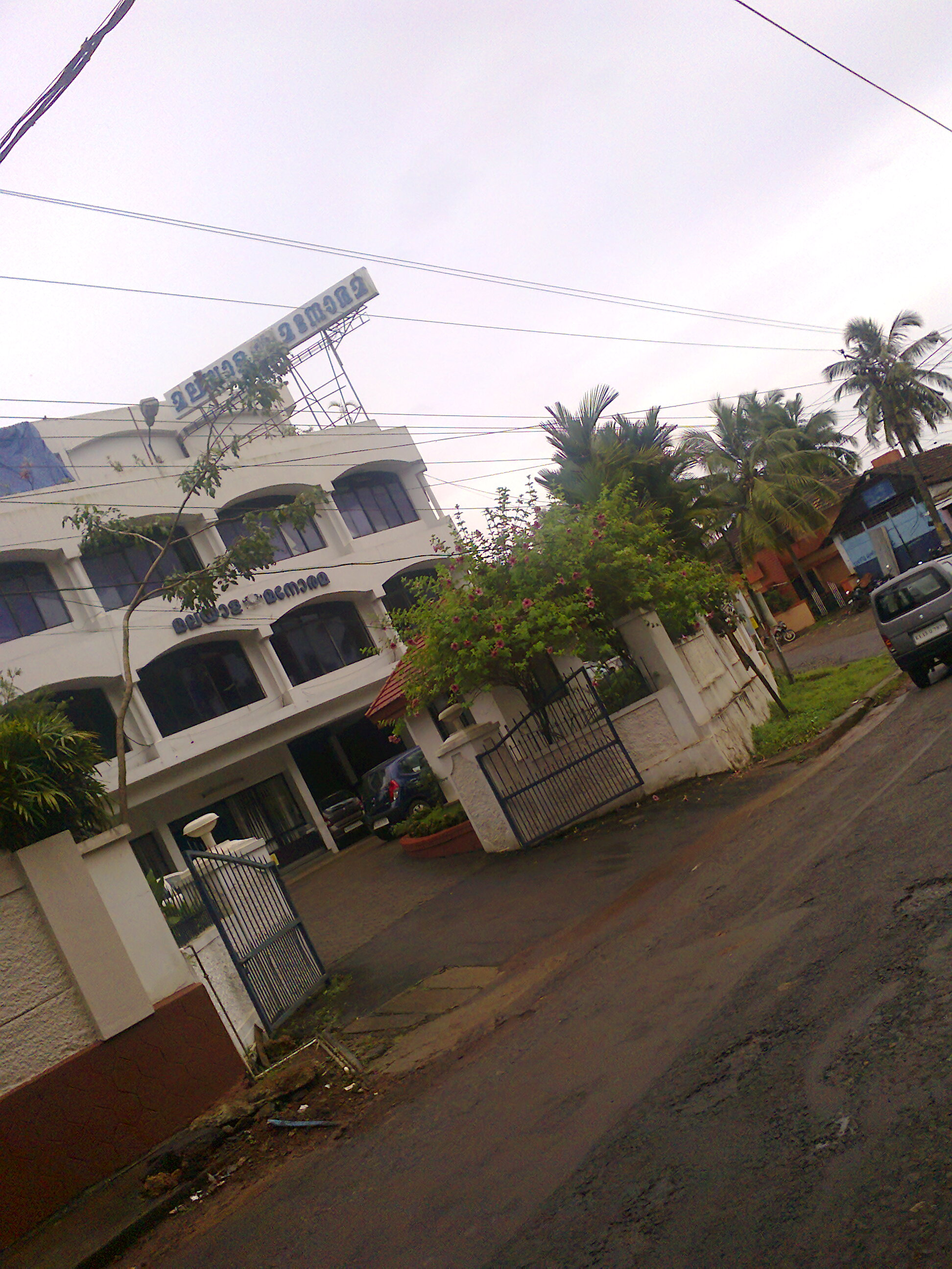 മലയാള മനോരമ കണ്ണൂർ എഡിഷൻ ഓഫീസ്,കാൽടെക്സ്നു സമിപംതായതെരു റോഡിലാണ് ഓഫീസ് സ്ഥിതി ചെയുന്നത്